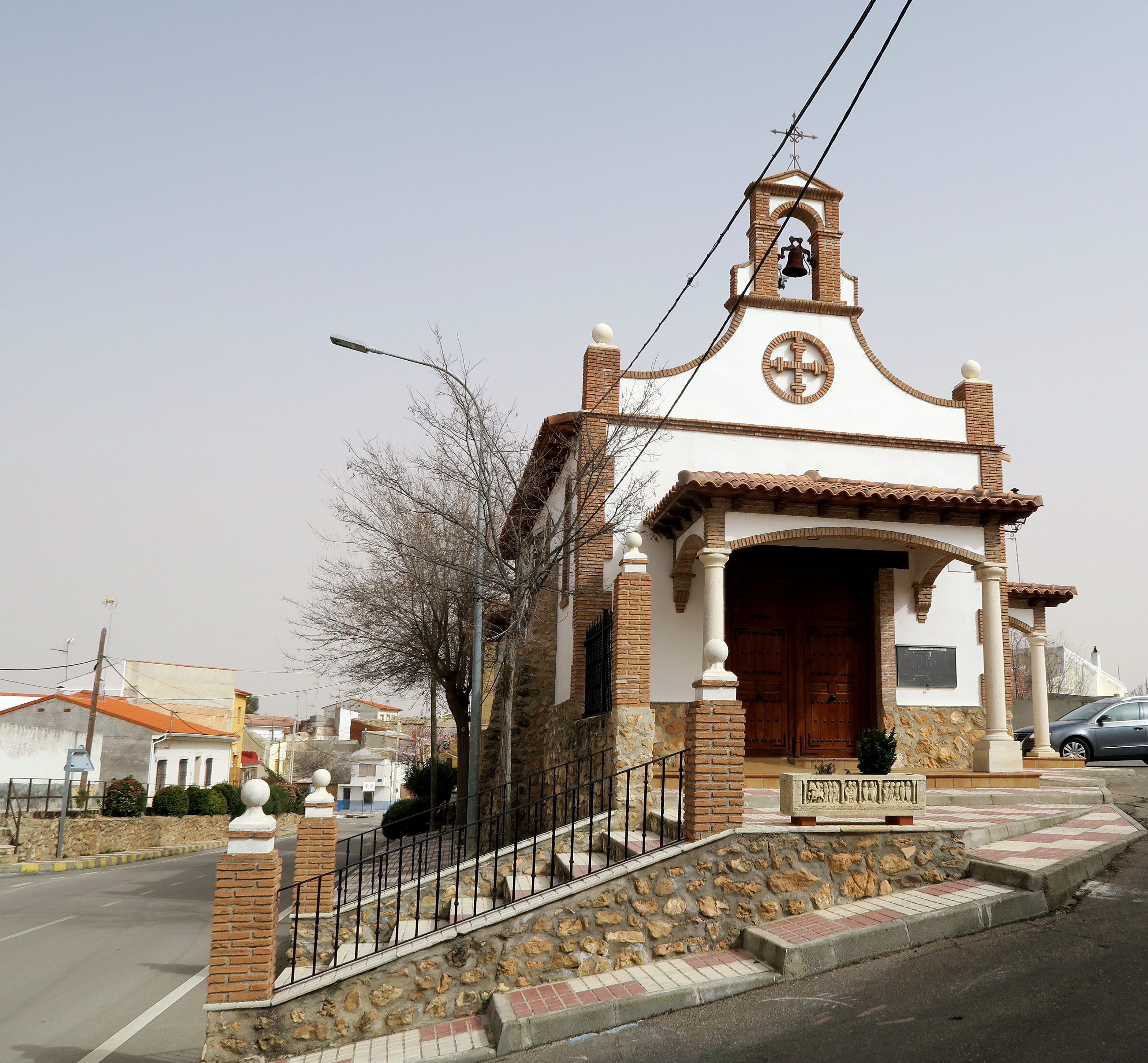 Ermita de San Jorge, Villatobas